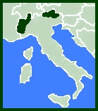 Mapa de situación de Alpes Italianos